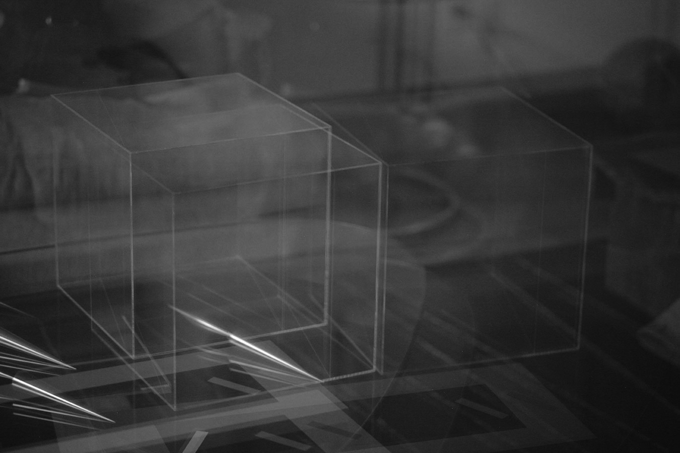 Carlos Fajardo, Neutral, 1966. Cubo de acrílico com desenho de outro cubo levemente deslocado riscado em sua superfície. Versão de 2014 a partir de instruções dadas na peça gráfica que completa a obra.